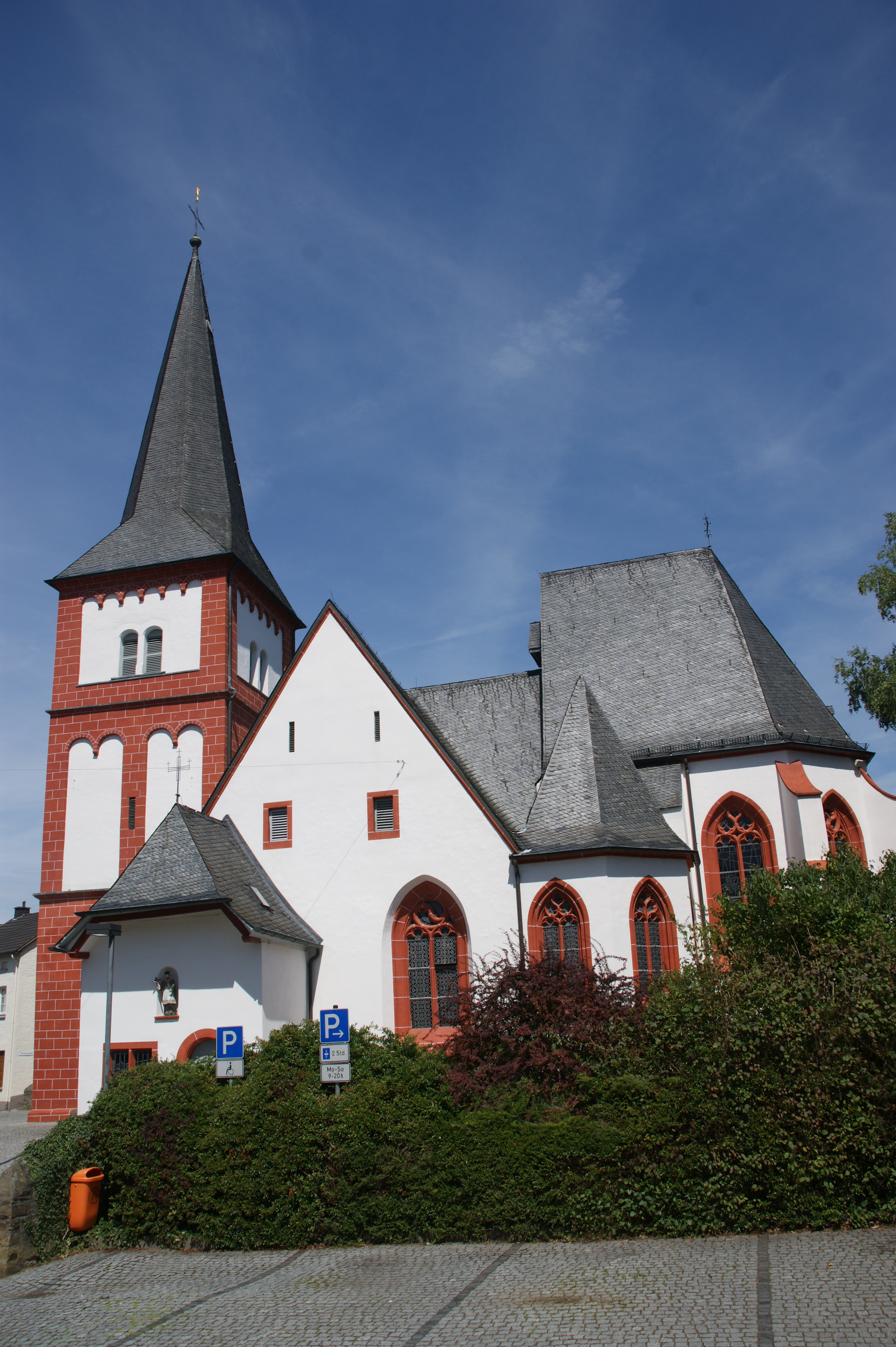 Kirche Sankt Johannes Baptist in Bruchhausen